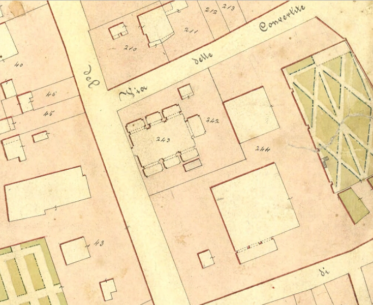 Dettaglio delle mappe del catasto gregoriano. Mostra l'isola 34 del rione Colonna. La particella 243